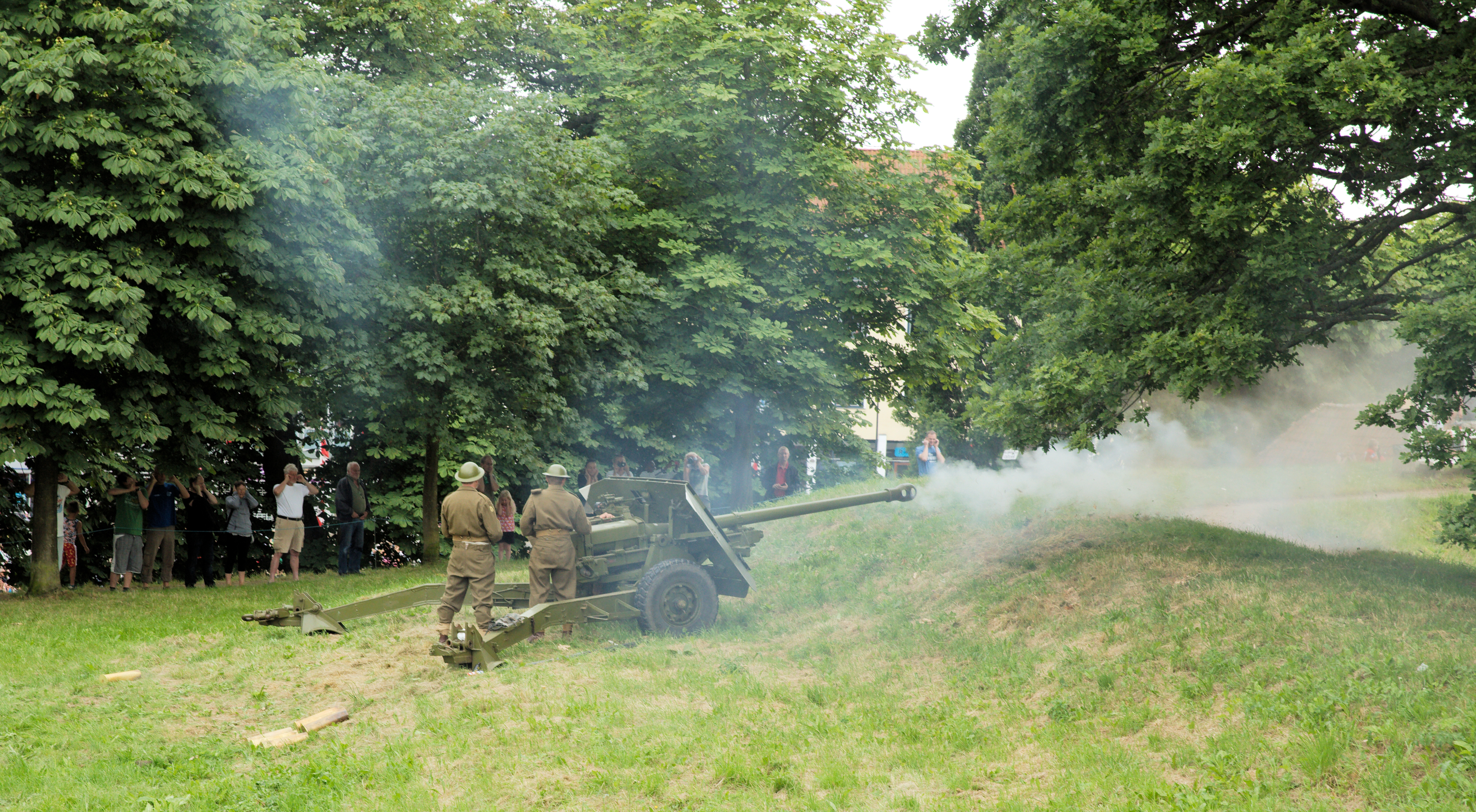 Kanonsalut 6. juli 2014 i Fredericia ved Landsoldaten